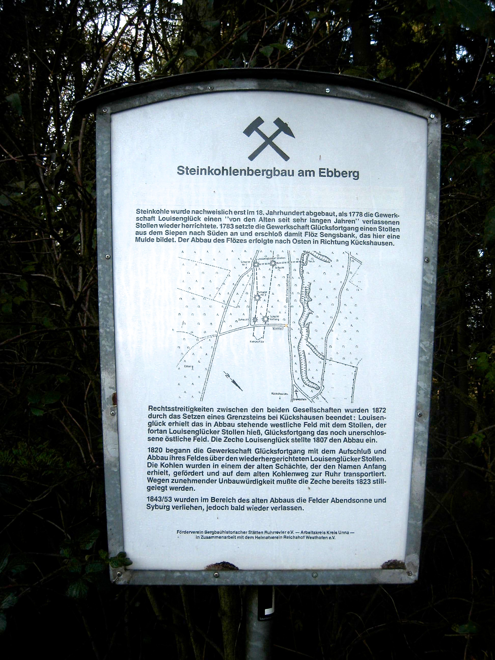 Informationstafel südwestlich von Gut Kückshausen zum Steinkohlebergbau am Ebberg, Schwerte-Westhofen